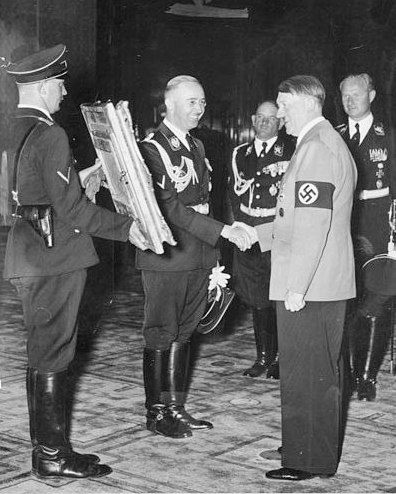 Title: 50. Geburtstag Hitler, Gratulation Himmler People in the image: Hitler, Adolf: Reichskanzler, Deutschland * Himmler, Heinrich: Reichsführer der SS, Deutschland (GND 11855123X) * Wolff, Karl: SS-Obergruppenführer, General, Adjutant Heinrich Himmlers, 1964 vom Schwurgericht München zu 15 Jahren Zuchthaus verurteilt, Bundesrepublik Deutschland * Dietrich, Joseph (Sepp): Generaloberst, Ritterkreuz (RK), SS-Oberst-Gruppenführer, Leibstandarte, Deutschland (GND 11888932X) Factual corrections and alternative descriptions are encouraged separately from the original description. Additionally errors can be reported at this page to inform the Bundesarchiv. Original historic description: Zentralbild Der Reichsführer SS und Chef der Deutschen Polizei Heinrich Himmler überbringt am 19.4.1939 Adolf Hitler seine Glückwünsche zu dessen 50. Geburtstag. U.B.z: v.l.: [Heinrich] Himmler, SS-Obergruppenführer Sepp Dietrich, Adolf Hitler und Karl Wolff Aufnahme: Hoffmann 5120-39 [Scherl Bilderdienst]